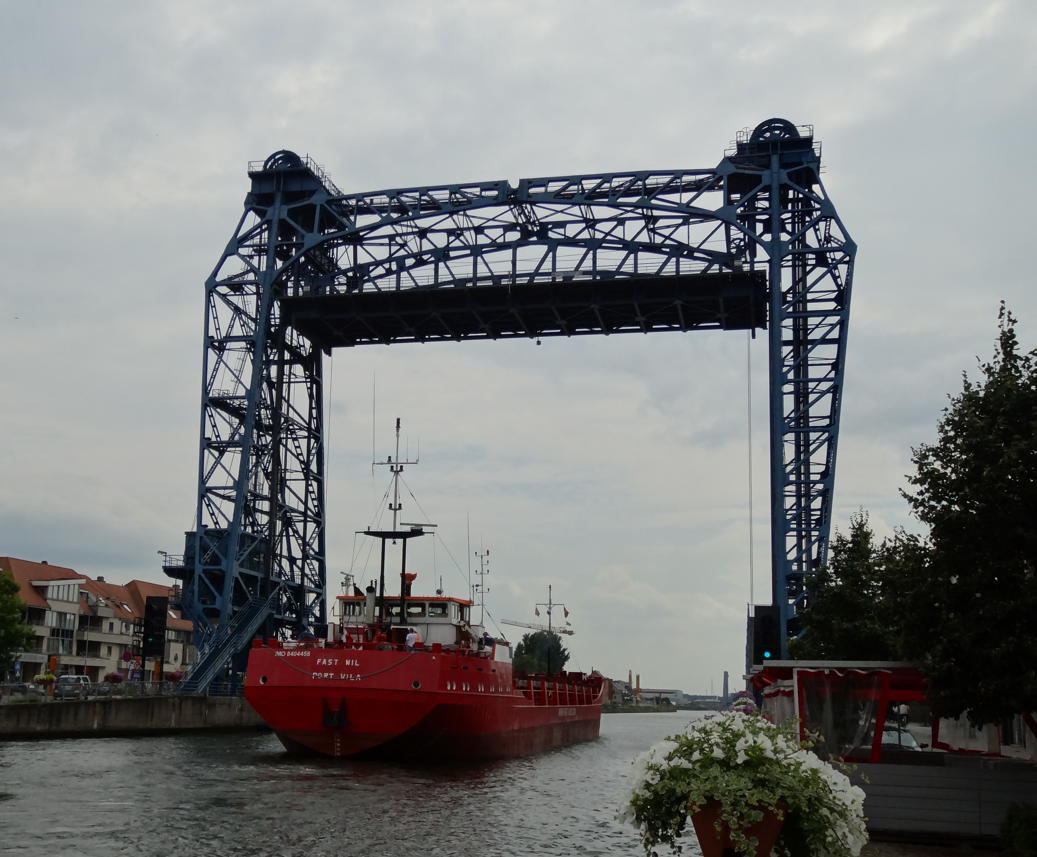 Vredesbrug over het Zeekanaal Brussel-Schelde in Willebroek geopend voor een zeeschip.